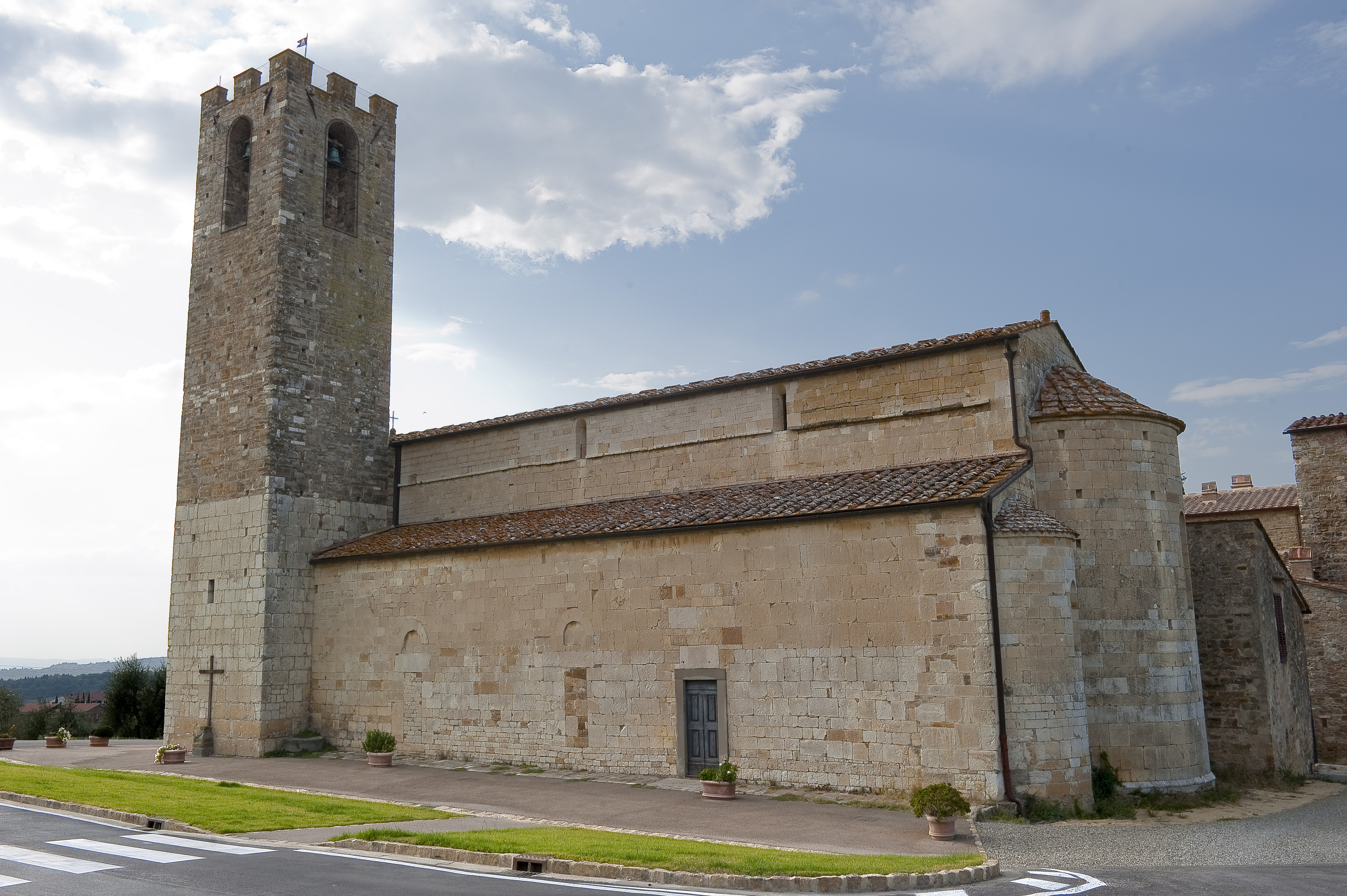 pieve di San Donato in Poggio-vista del fianco meridionale e dell'abside